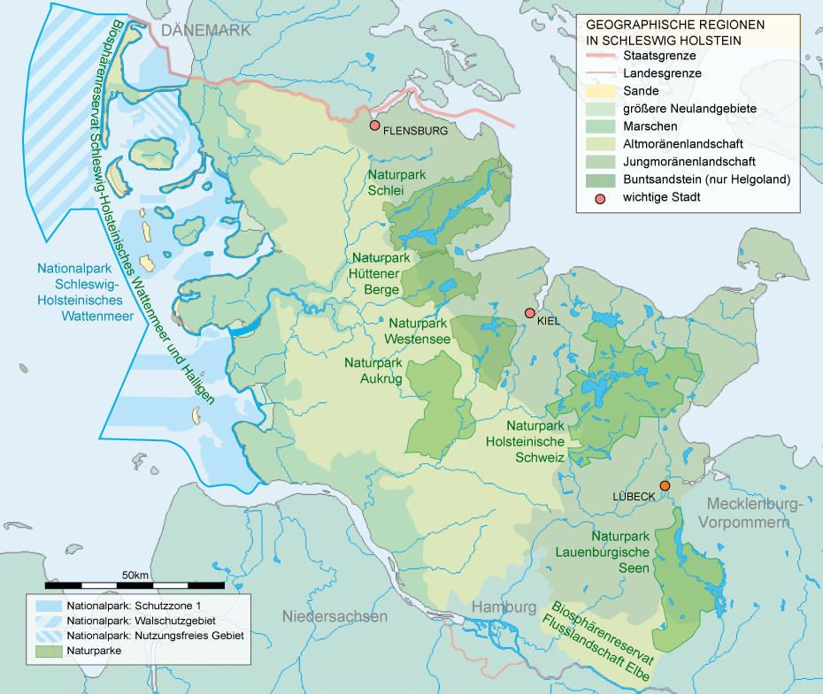 Nationalpark und Naturparke in Schleswig-Holstein